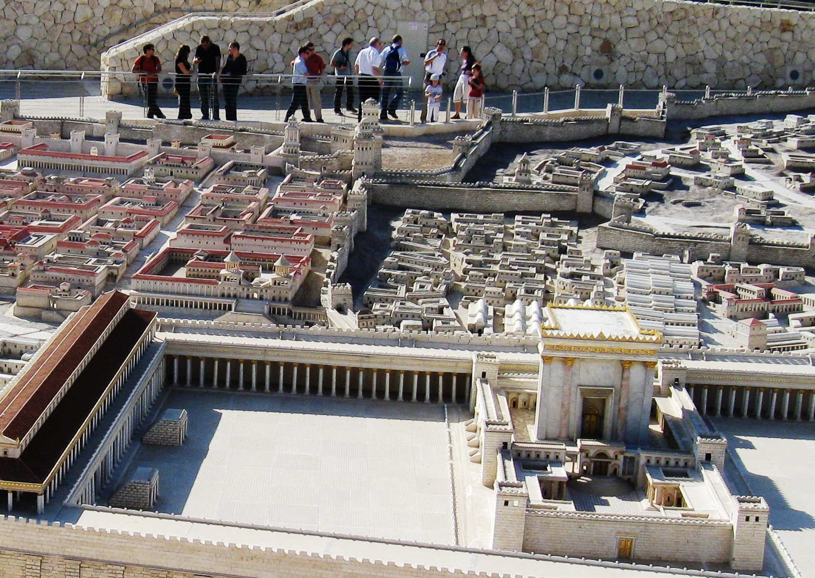 מבט על המגדלים ממזרח רישיון נוצר על ידי משתמש:Daniel Ventura